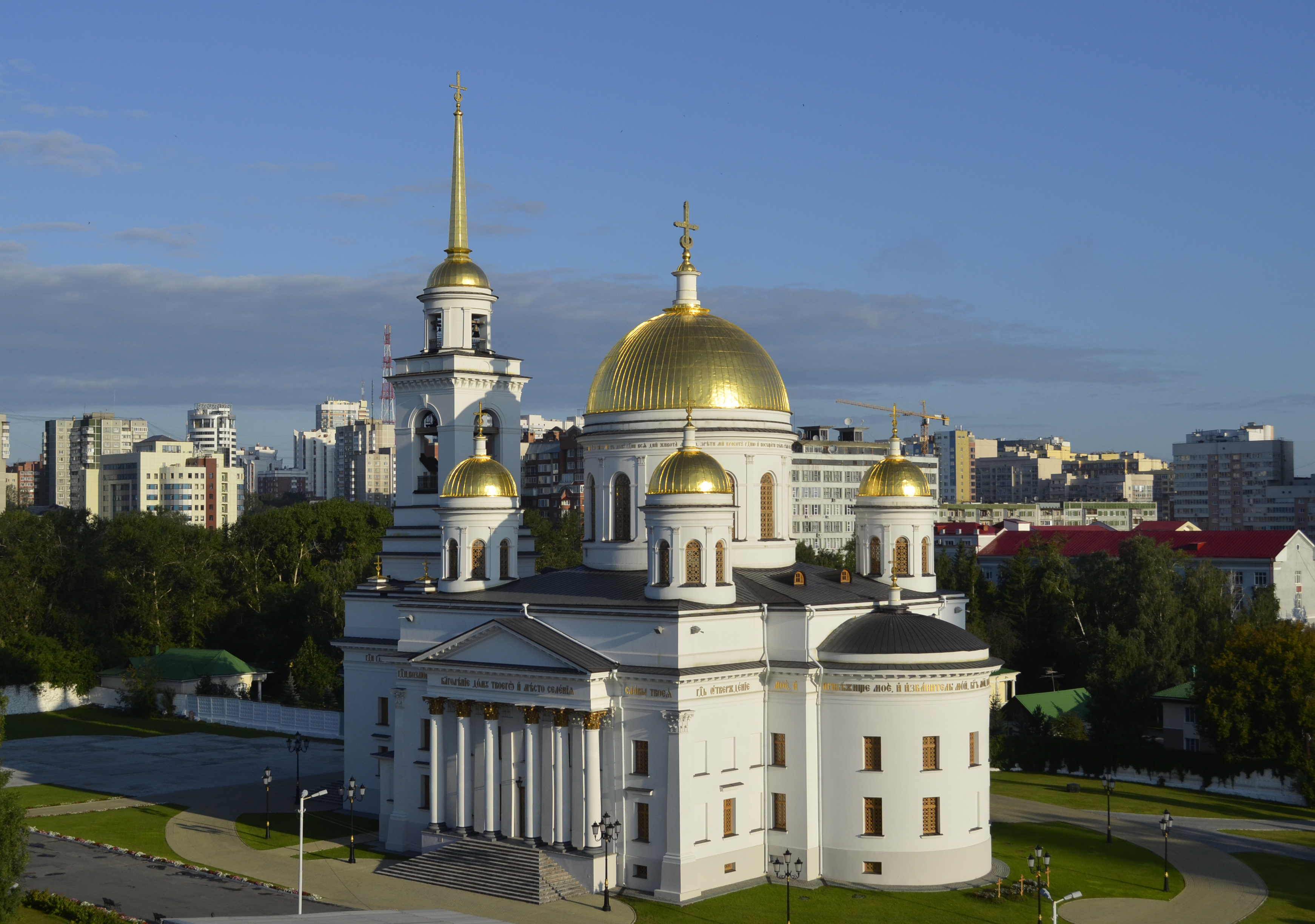 собор Александра Невского: улица Декабристов, район Зеленой рощи, Екатеринбург, Свердловская область